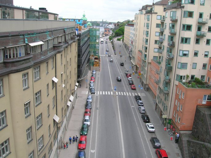 Katarinavägen, Stockholm, Sweden